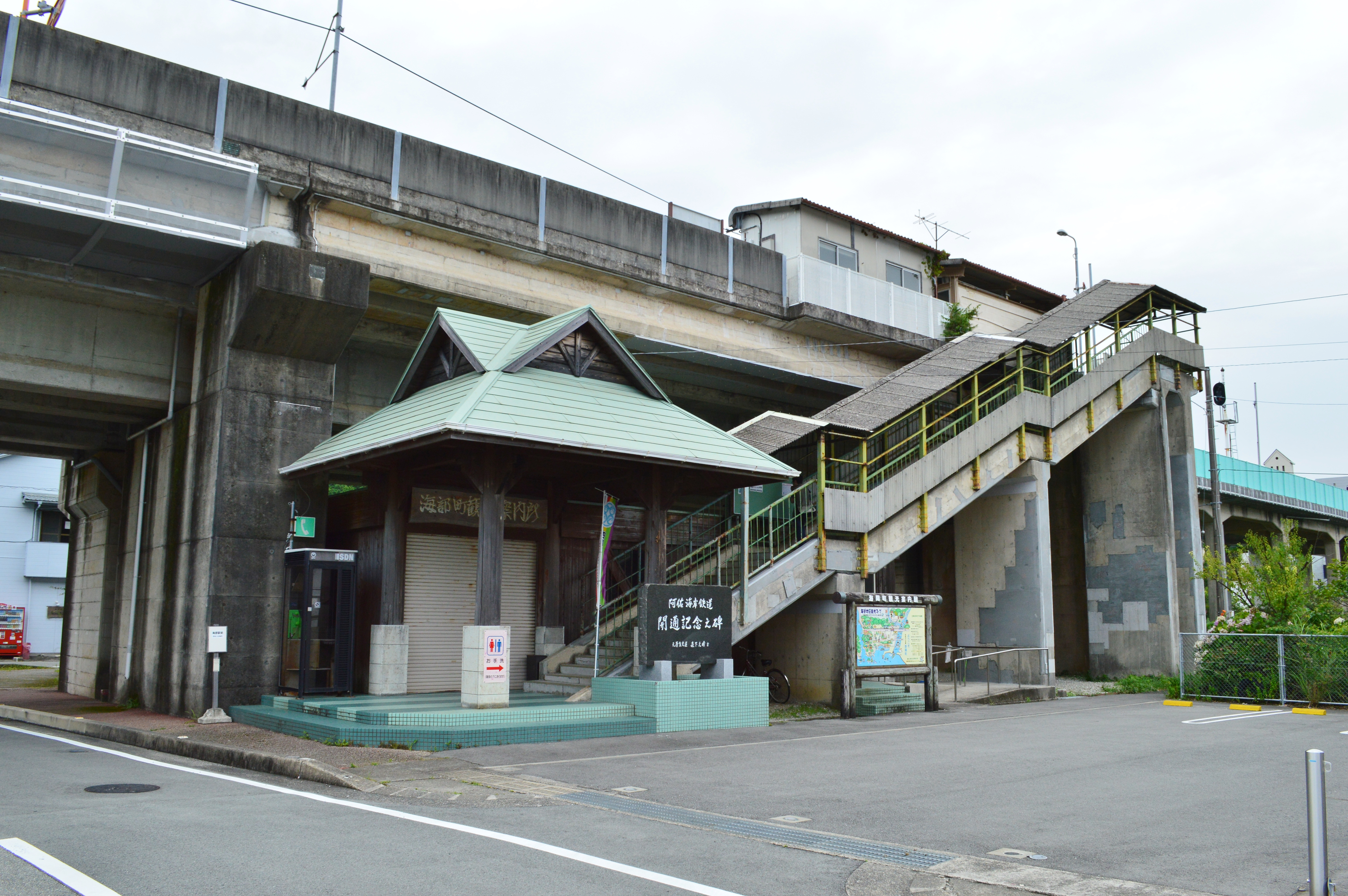 海部駅 駅舎